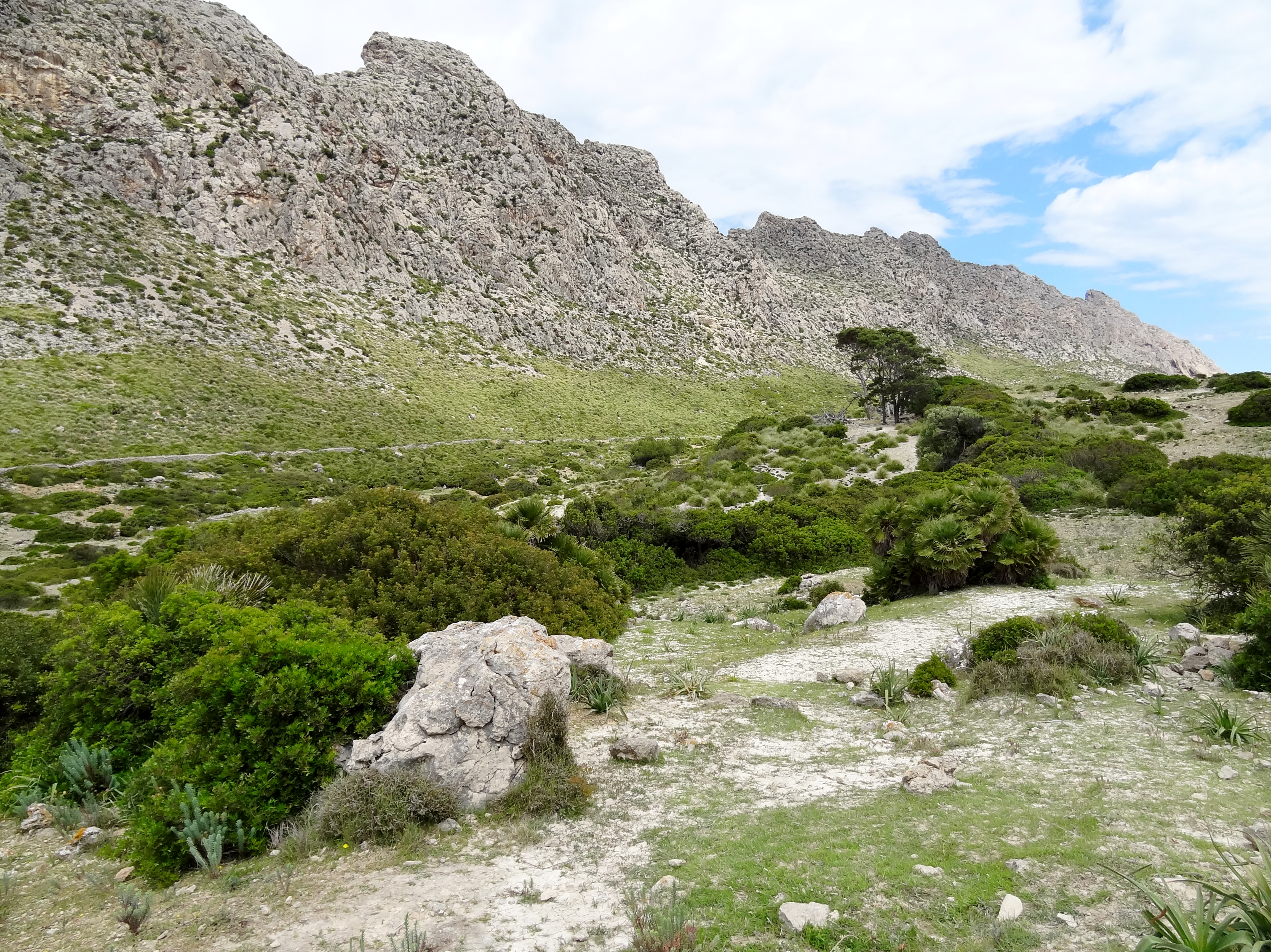 Vall de Bóquer in der Gemeinde Pollença, Mallorca, Spanien